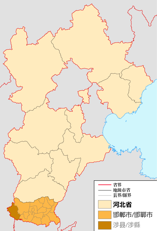 涉县地图